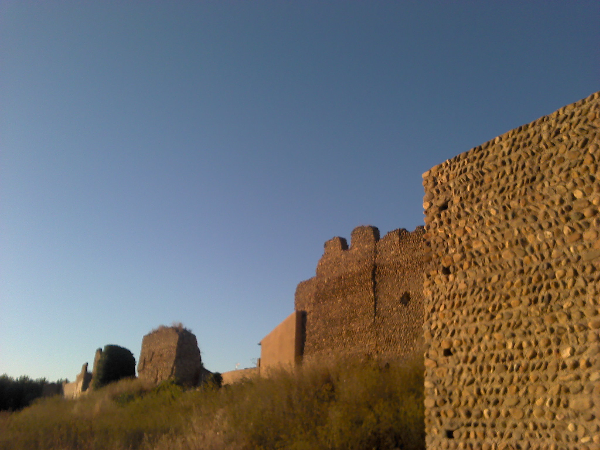 Vista del Recinto Amurallado de Mansilla de las Mulas desde la puerta de san Agustín.